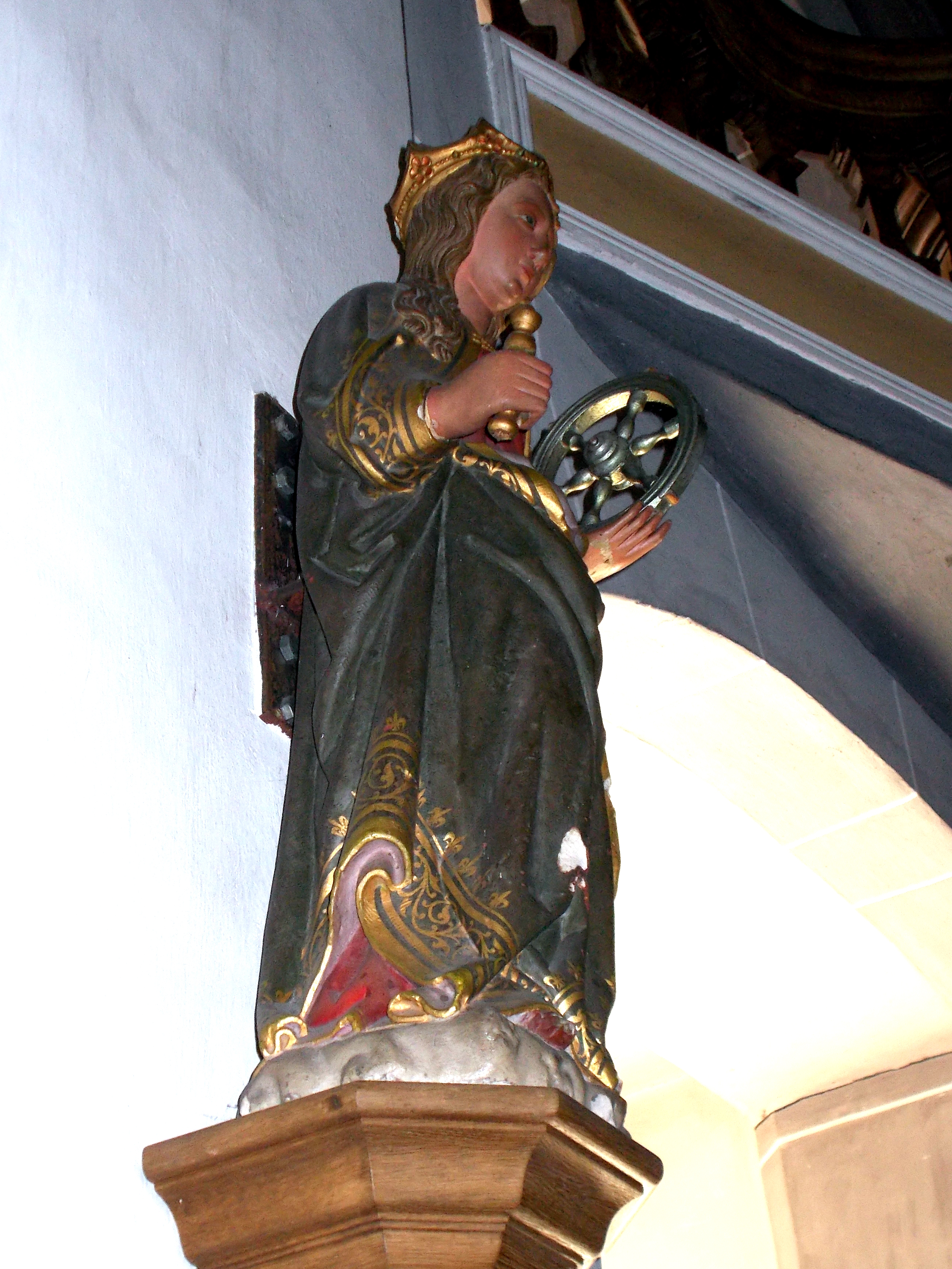 Statue der Heiligen Katharina. Sie gilt als Patronin der Vorgängerkirche.